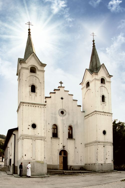 Gornji Dolac Travnik crkva